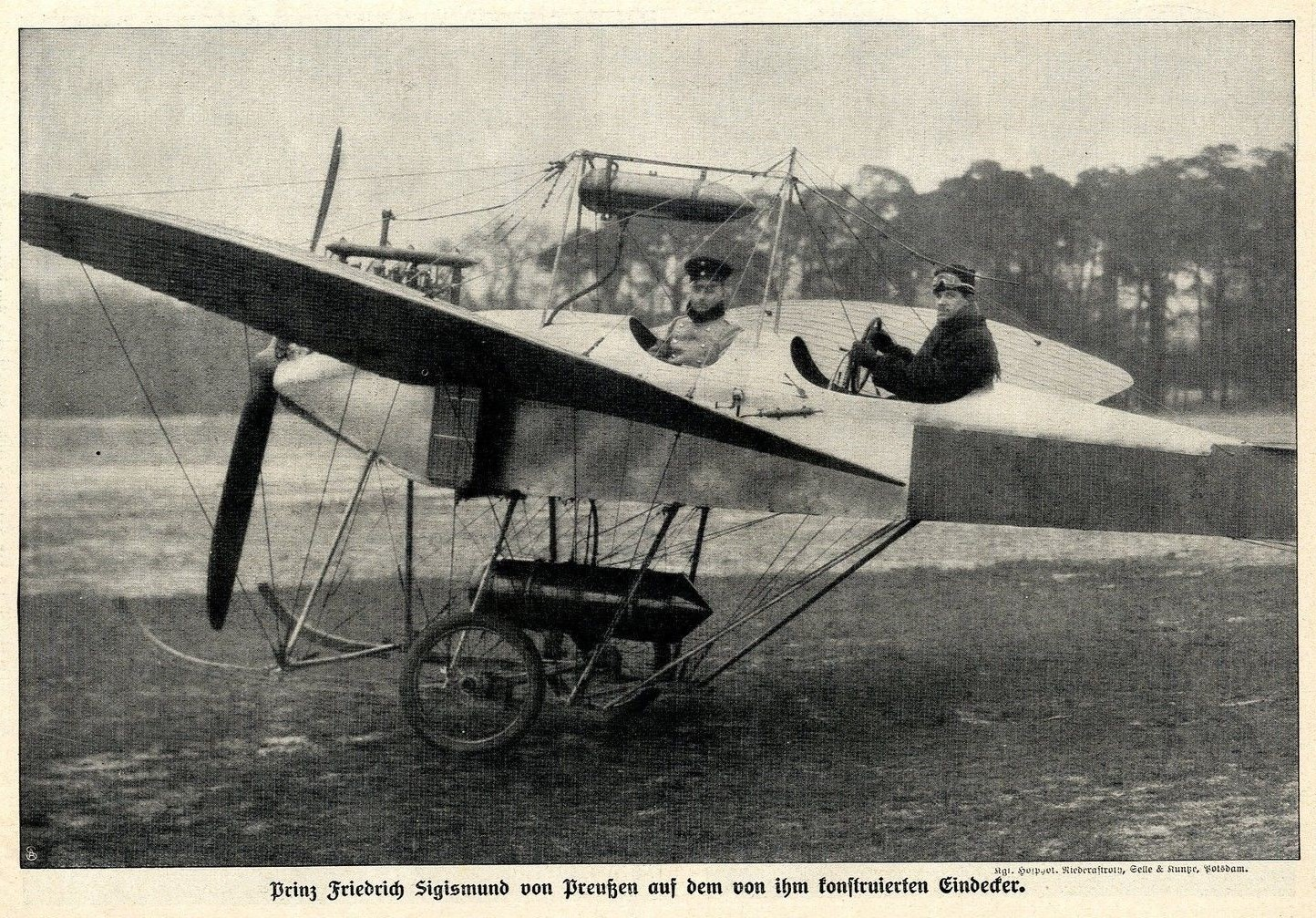 Prinz Friedrich Sigismund von Preußen auf dem von ihm konstruierten Eindecker, 1913